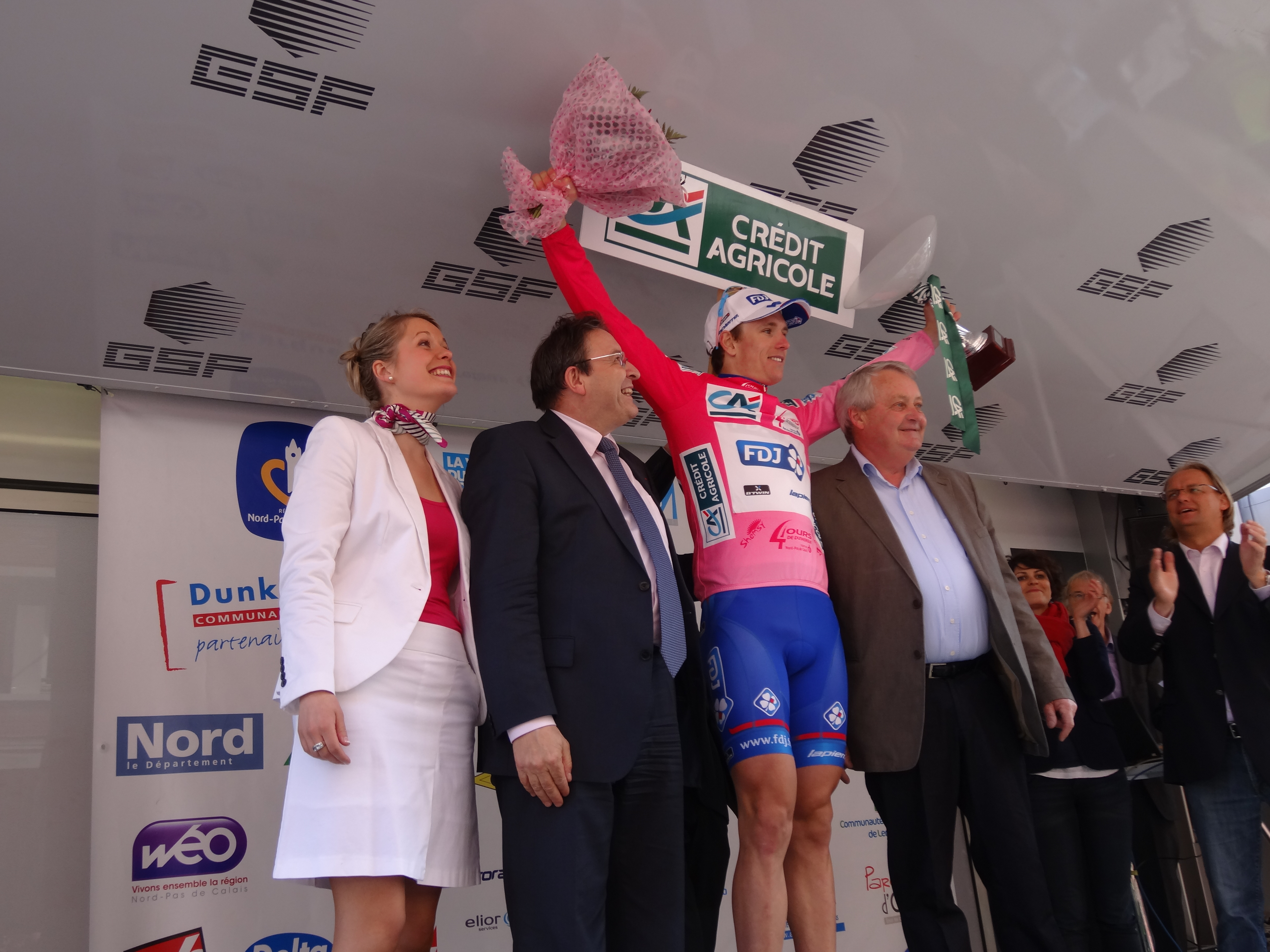 Reportage photographique réalisé le dimanche 5 mai 2013 à l'arrivée de la cinquième et dernière étape de l'édition 2013 des Quatre jours de Dunkerque à Dunkerque, Nord, Nord-Pas-de-Calais, France. Depicted person: Arnaud Démare